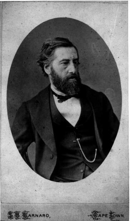 Jan Carel Juta. Foto Cape Town 1863